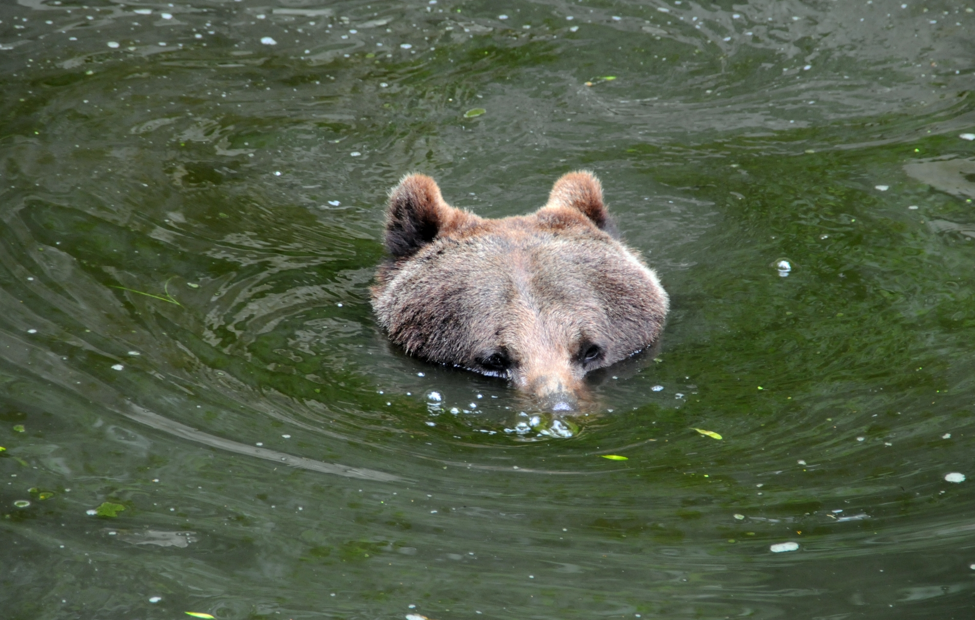 Ursus arctos arctos, Tier- und Pflanzenpark Fasanerie, Wiesbaden, Hessen, Deutschland